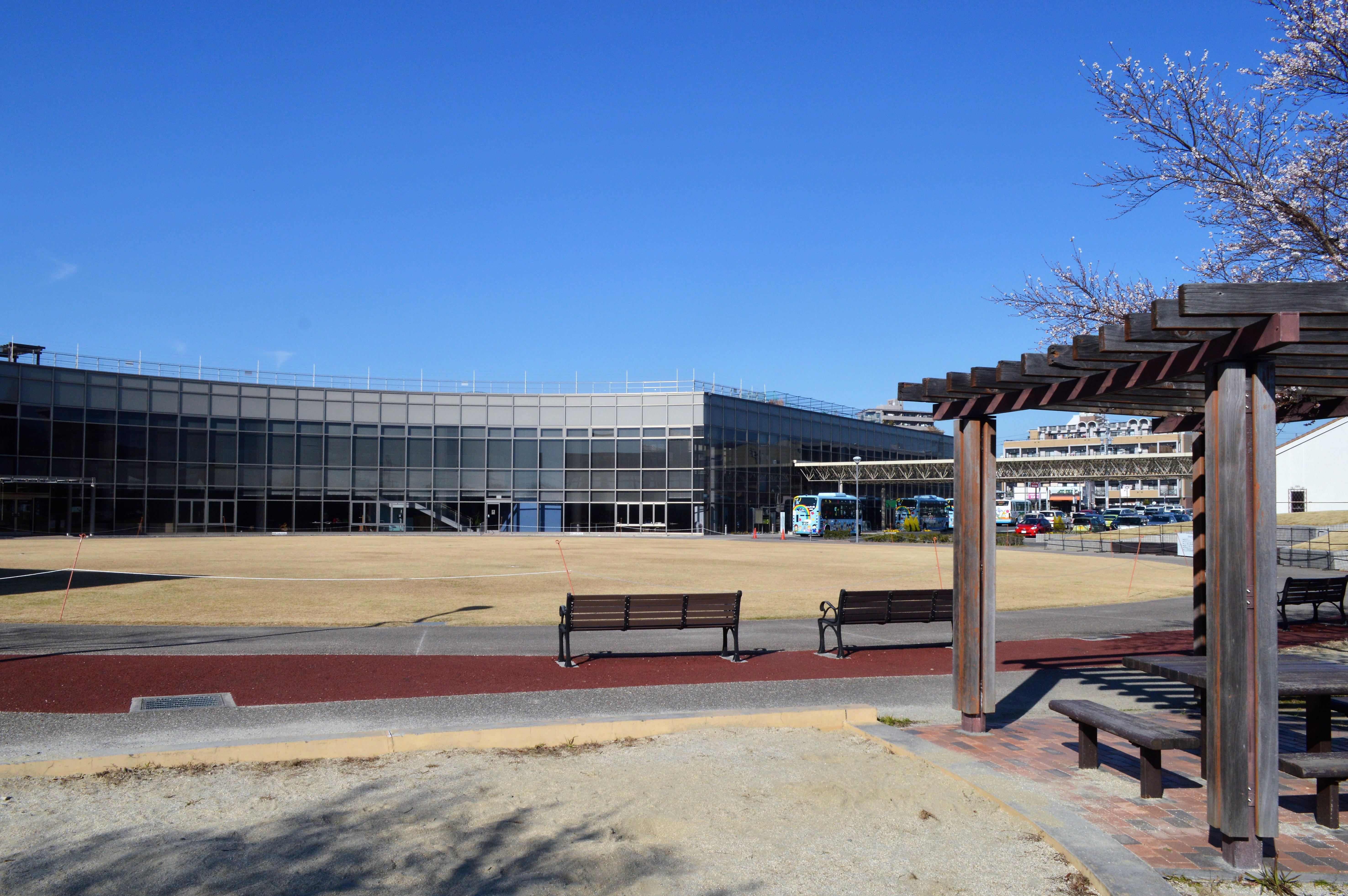 愛知県愛知郡東郷町のイーストプラザいこまい館。